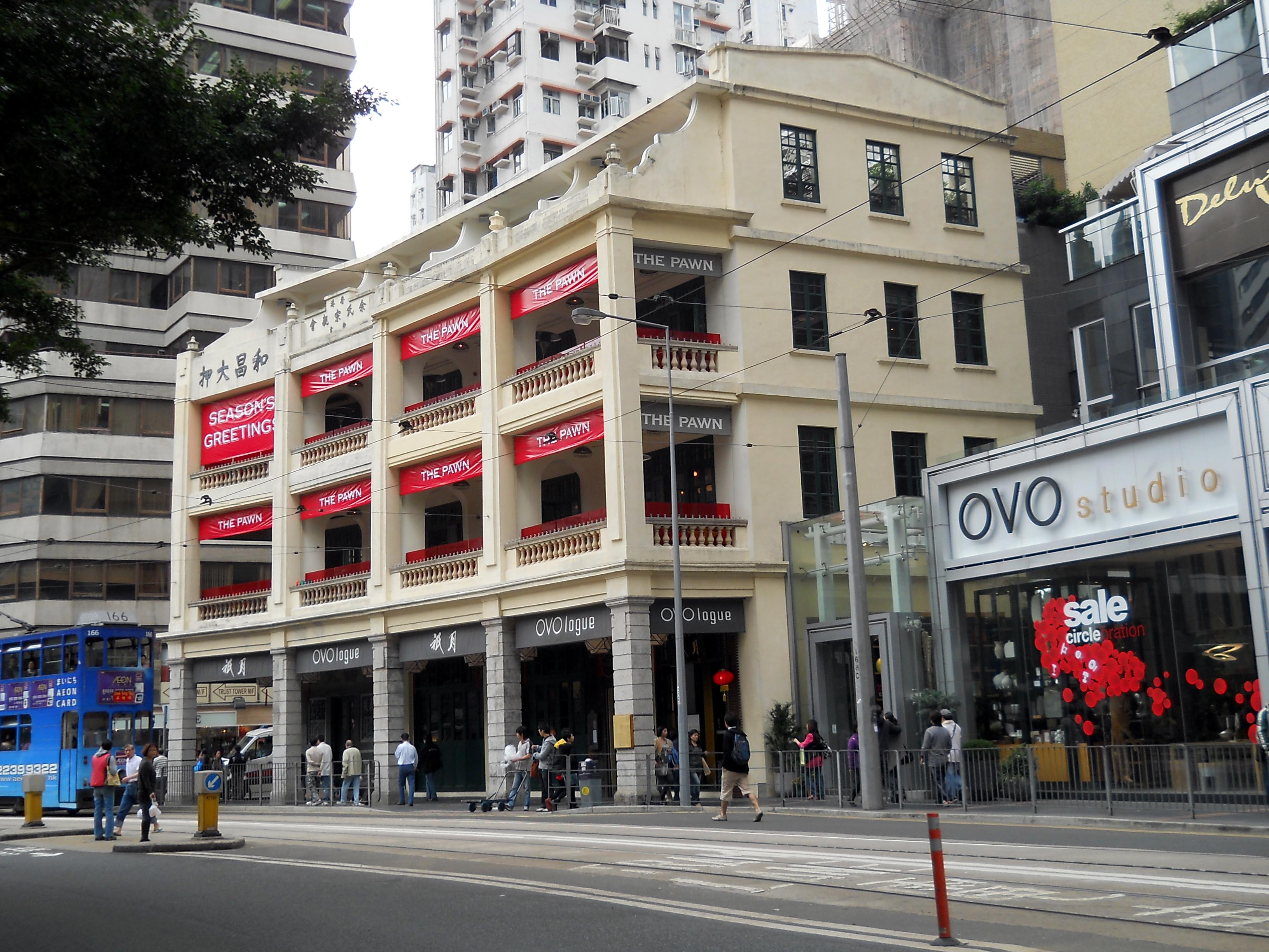 中文（香港）: 莊士敦道60-66號